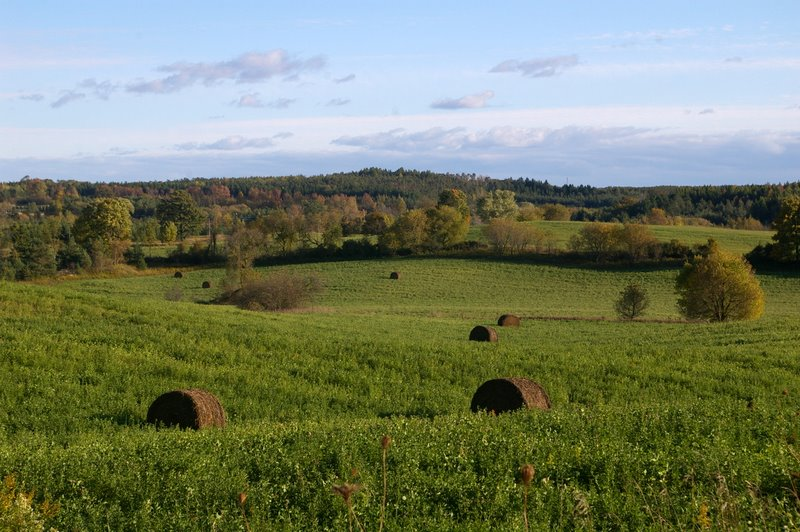 pastoral vista